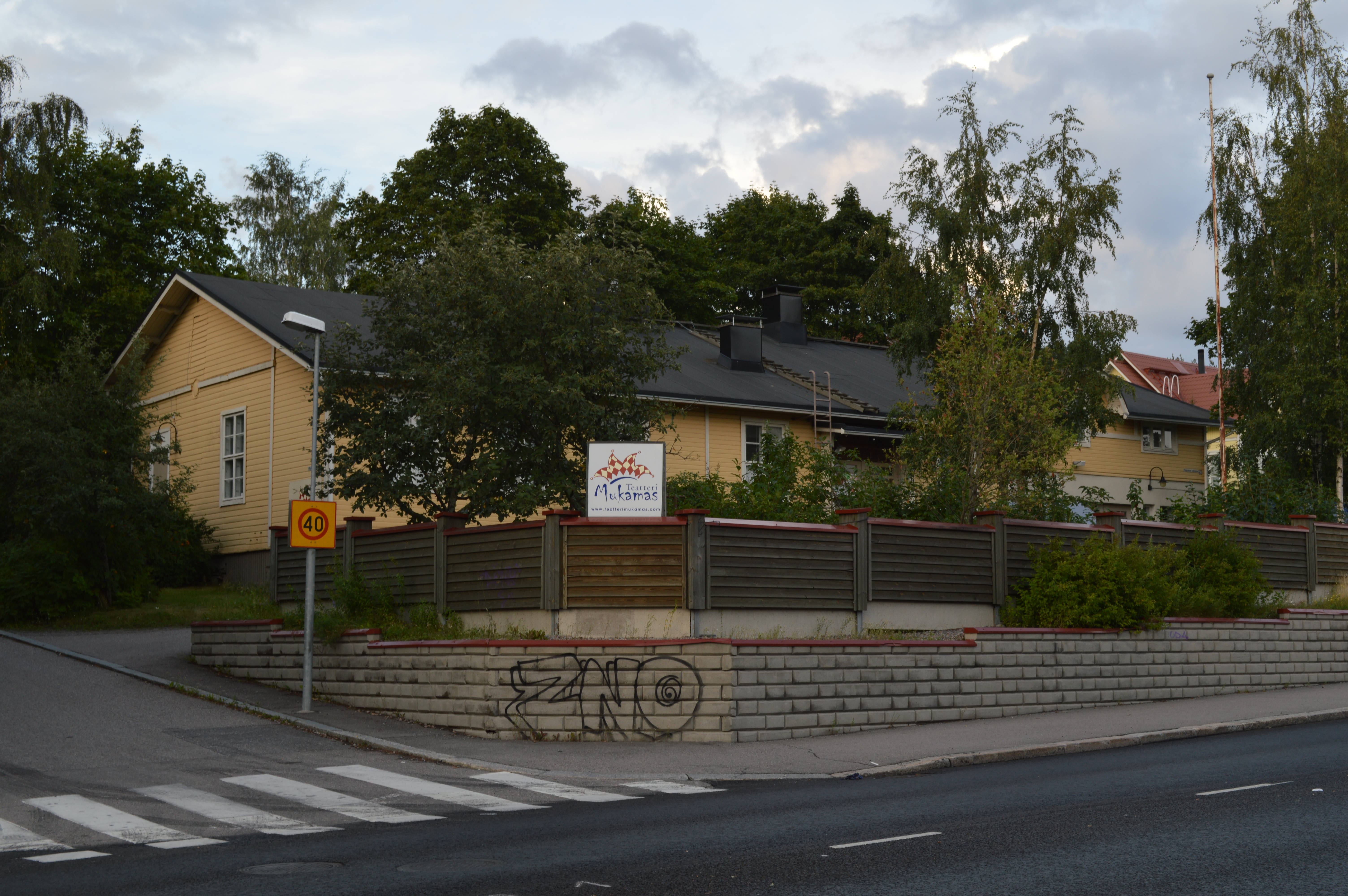 Teatteri Mukamas